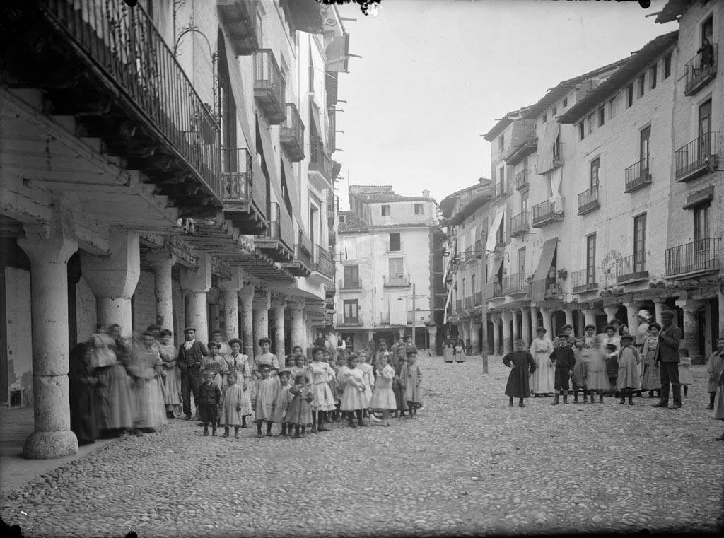 Imatge